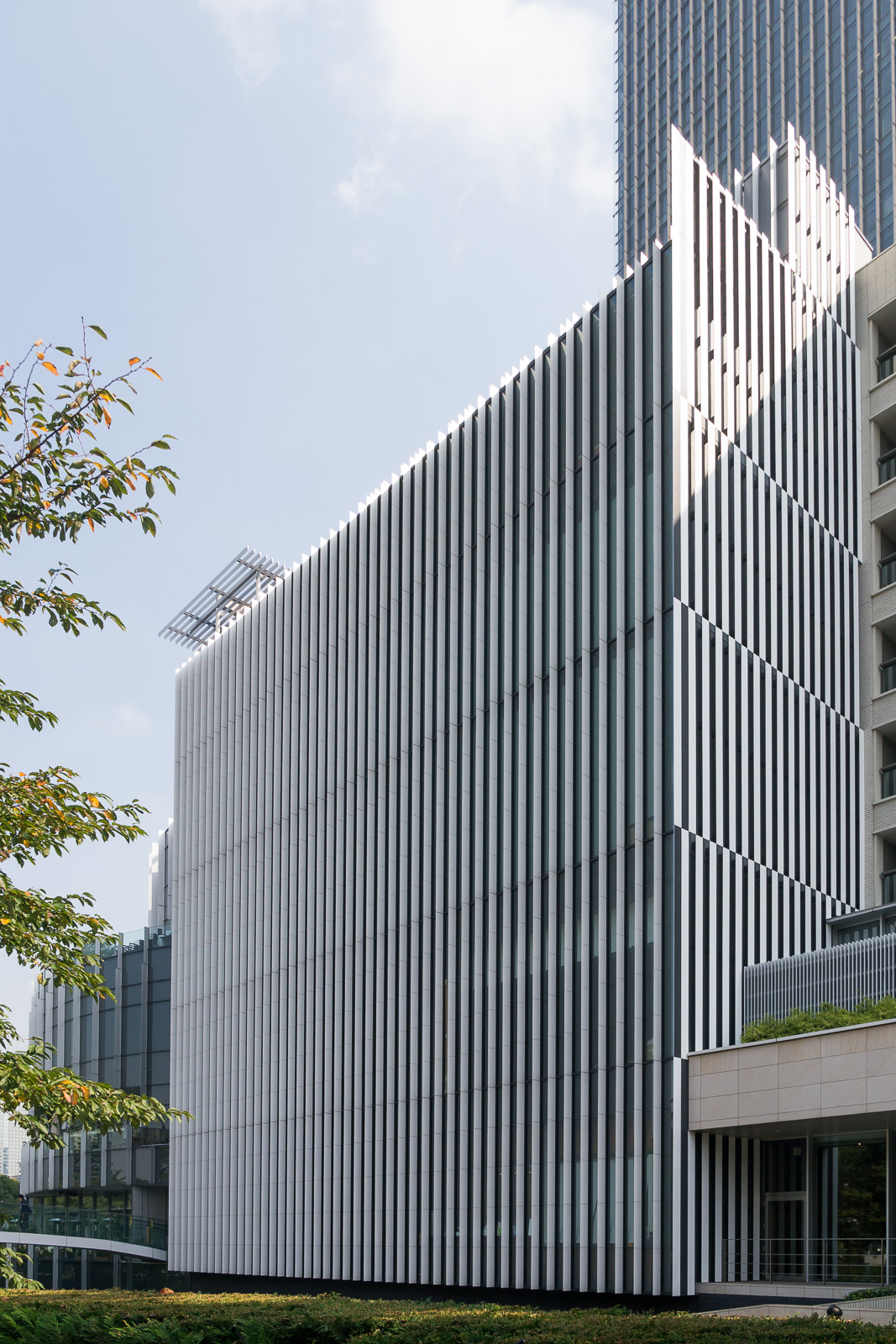 東京ミッドタウン・ガレリア、サントリー美術館。